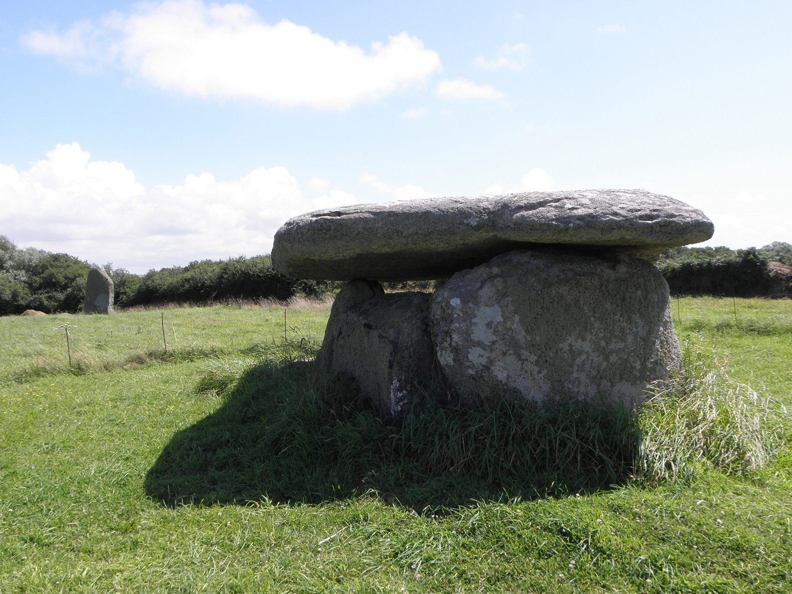 Dolmen et menhir de Kerivoret en Porspoder (29).